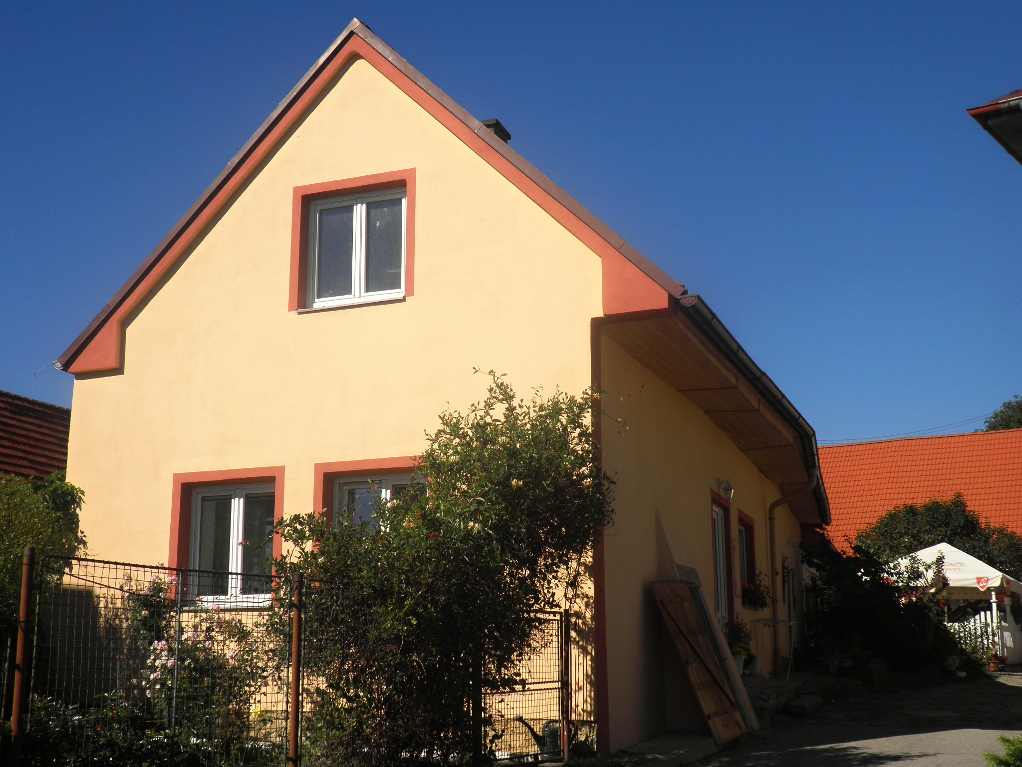 venkovská usedlost (Nesměň), Nesměň 13